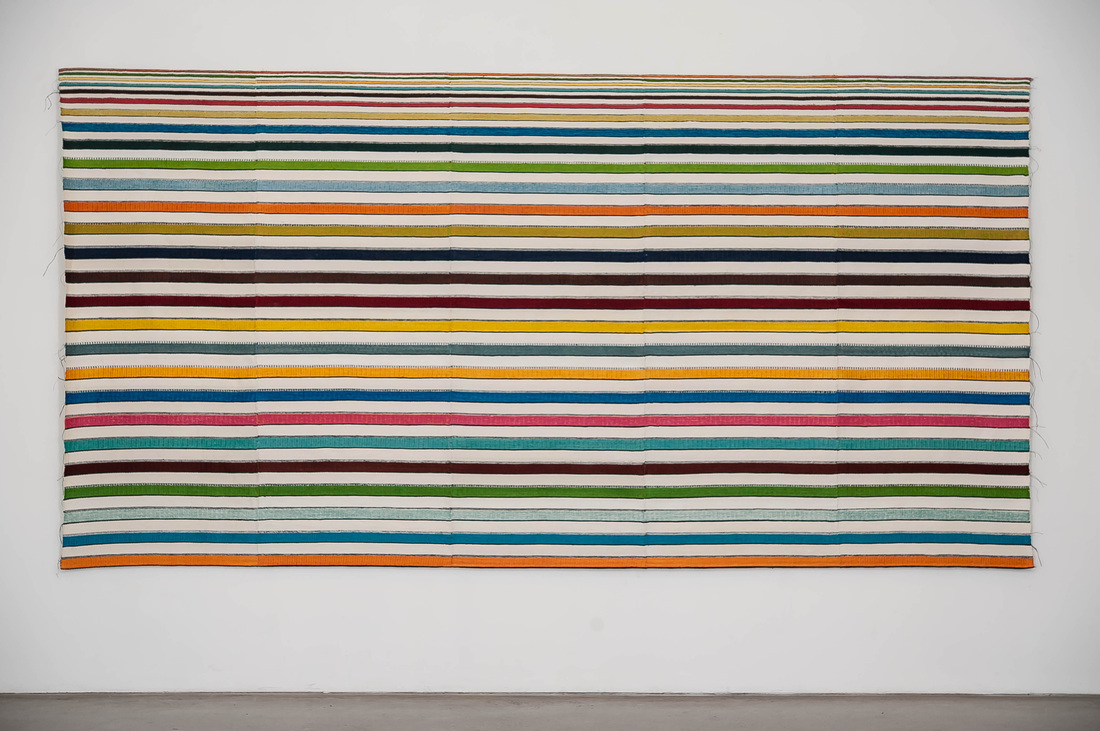 "Passing through." Vev